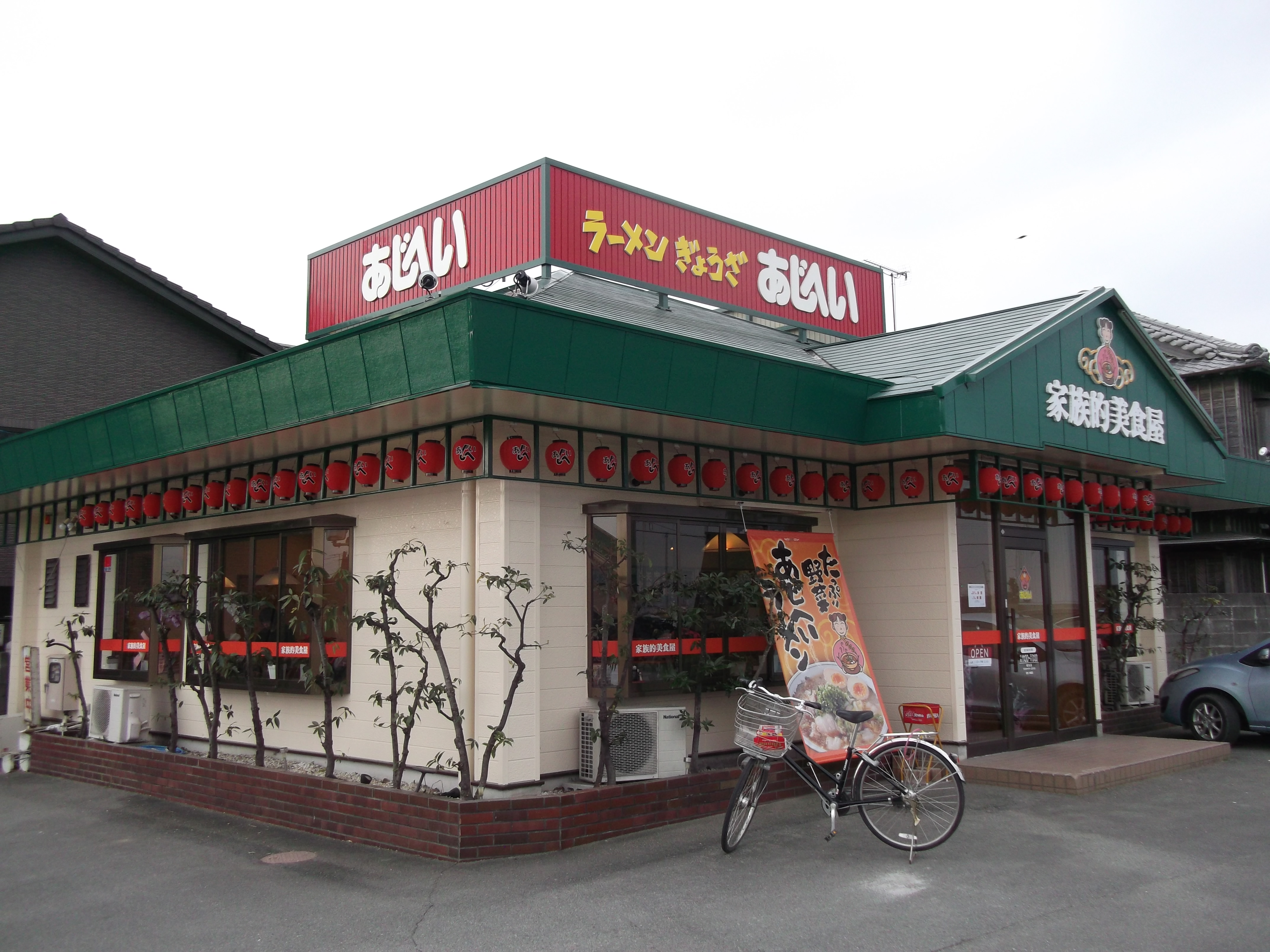 三重県松阪市早馬瀬町のあじへい櫛田店を東側公道より撮影